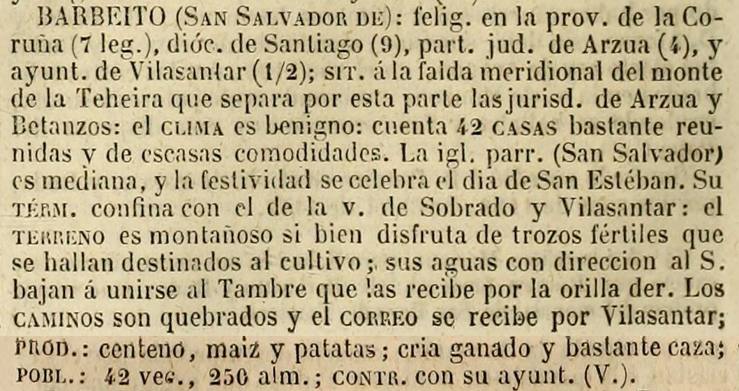 Barbeito no Diccionario geográfico-estadístico-histórico de España y sus posesiones de Ultramar.